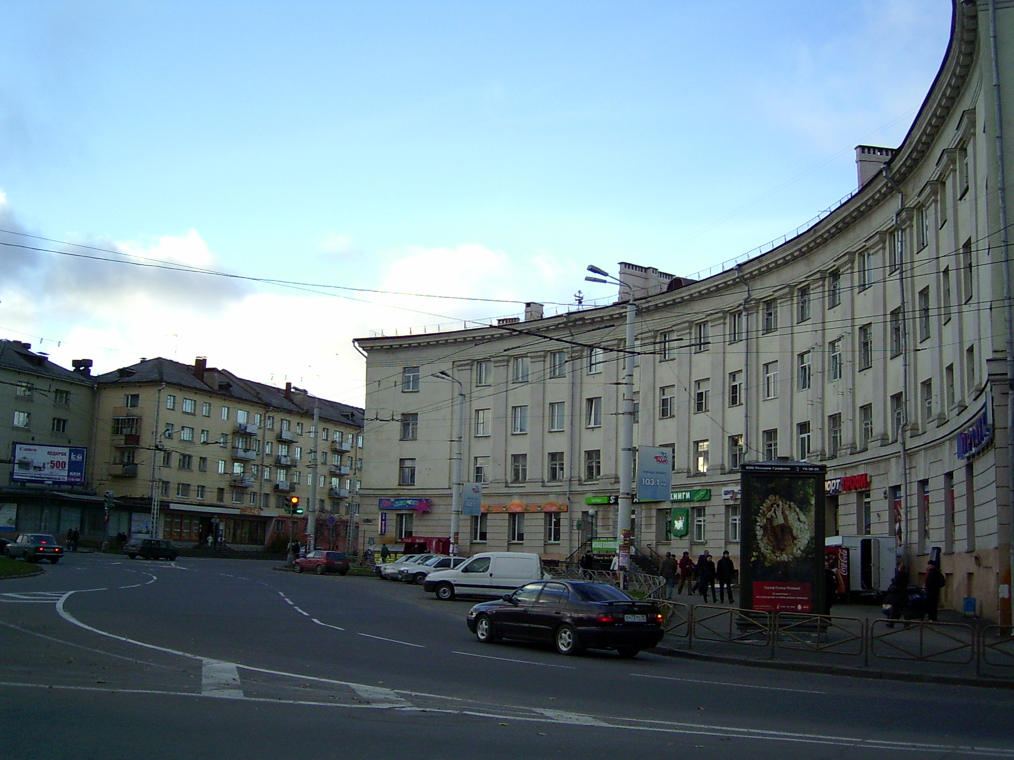 Gagarin Square in Petrozavodsk